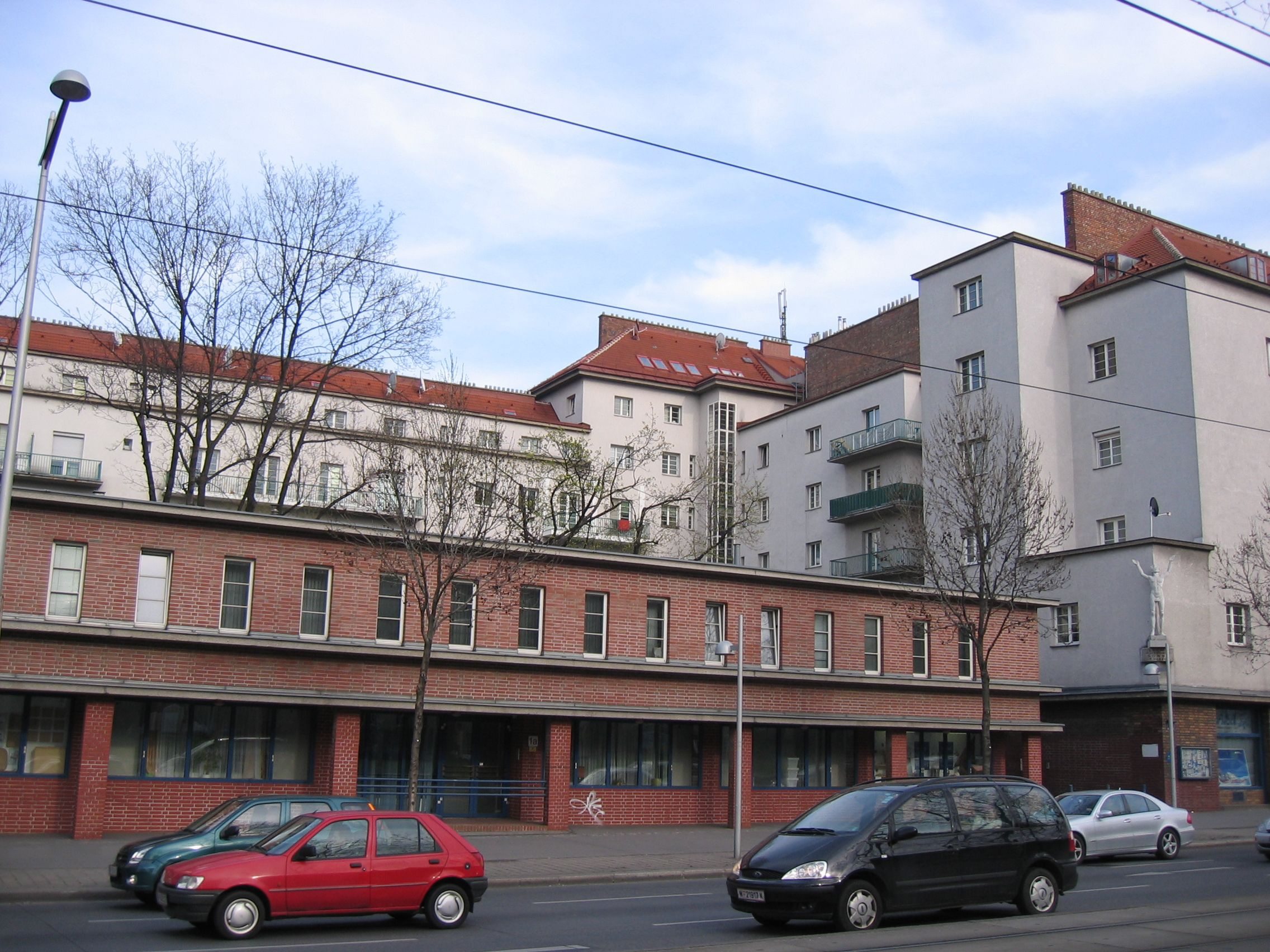 Franz Domes Hof - Innenhof mit Geschäften davor